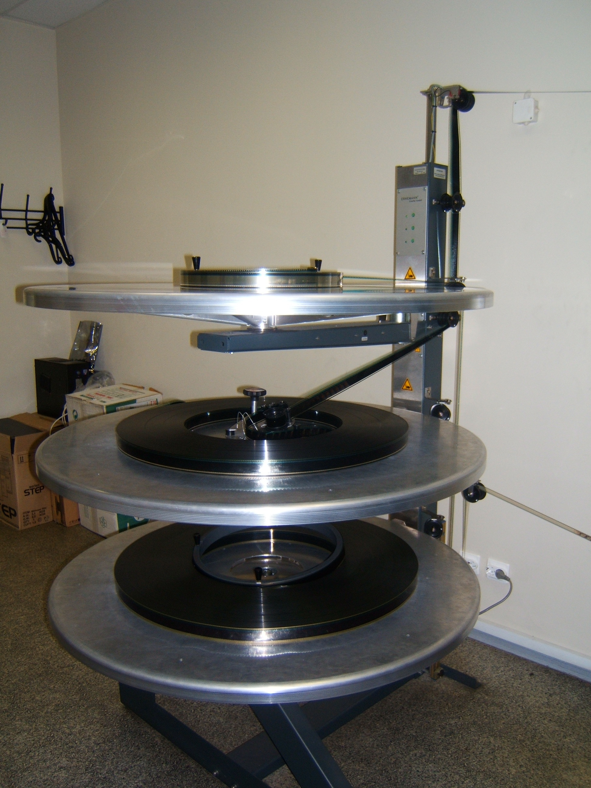 Плеттер во время кинопроекции